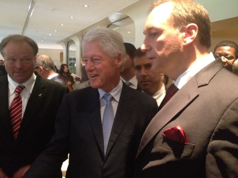 Christian Kirk (r.) mit Bundesminister Dirk Niebel und dem 42. US-Präsidenten Bill Clinton am 26. Mai 2013 aus Anlass der Kooperationsunterzeichnung zwischen dem BMZ und der Clinton-Foundation bzgl. der Zusammenarbeit bei der Hilfe für Afrika.